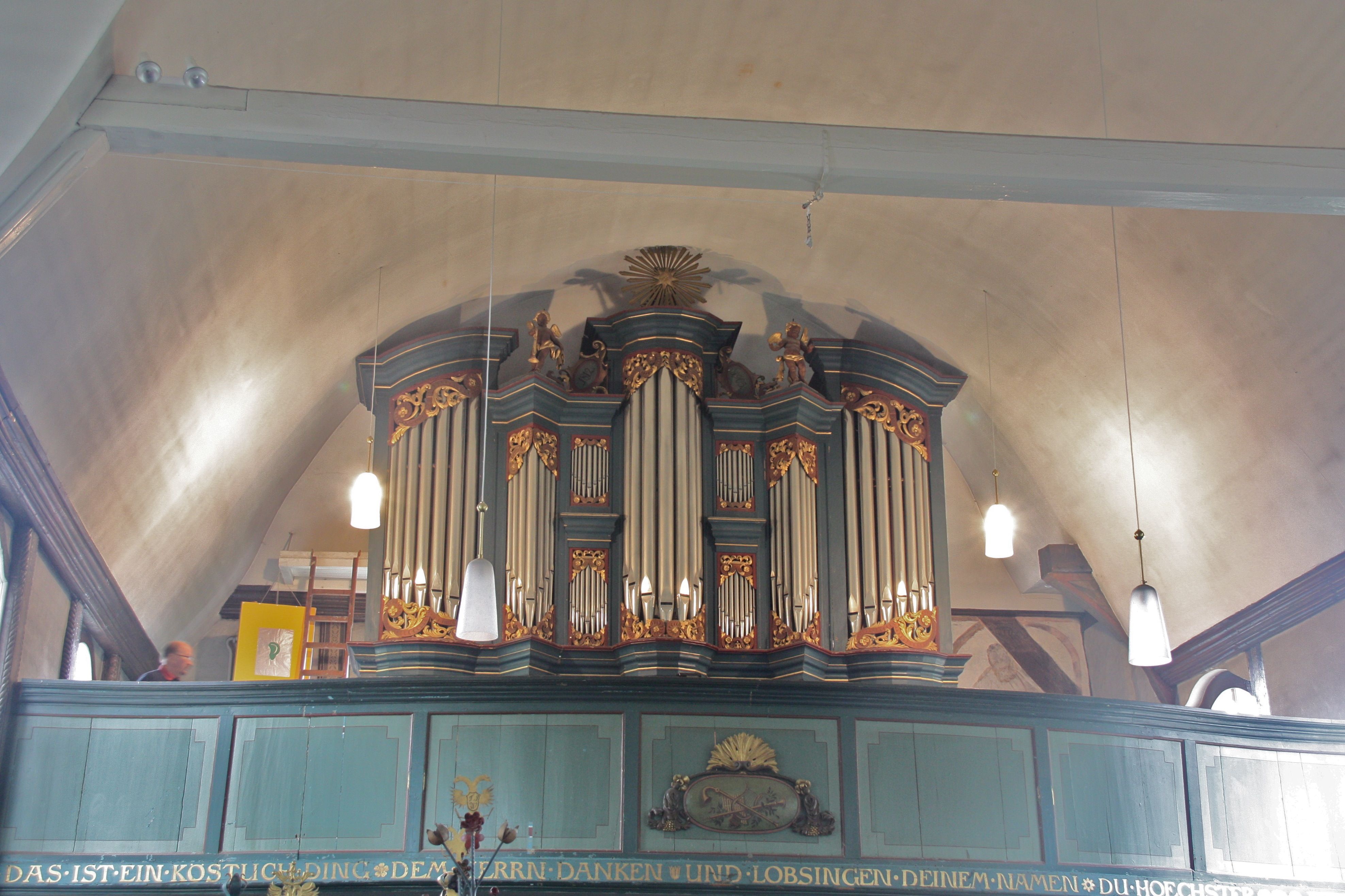 Hamburg, Curslack, St. Johannis-Kirche, Hauptorgel, Führer 1968This is a photograph of an architectural monument.